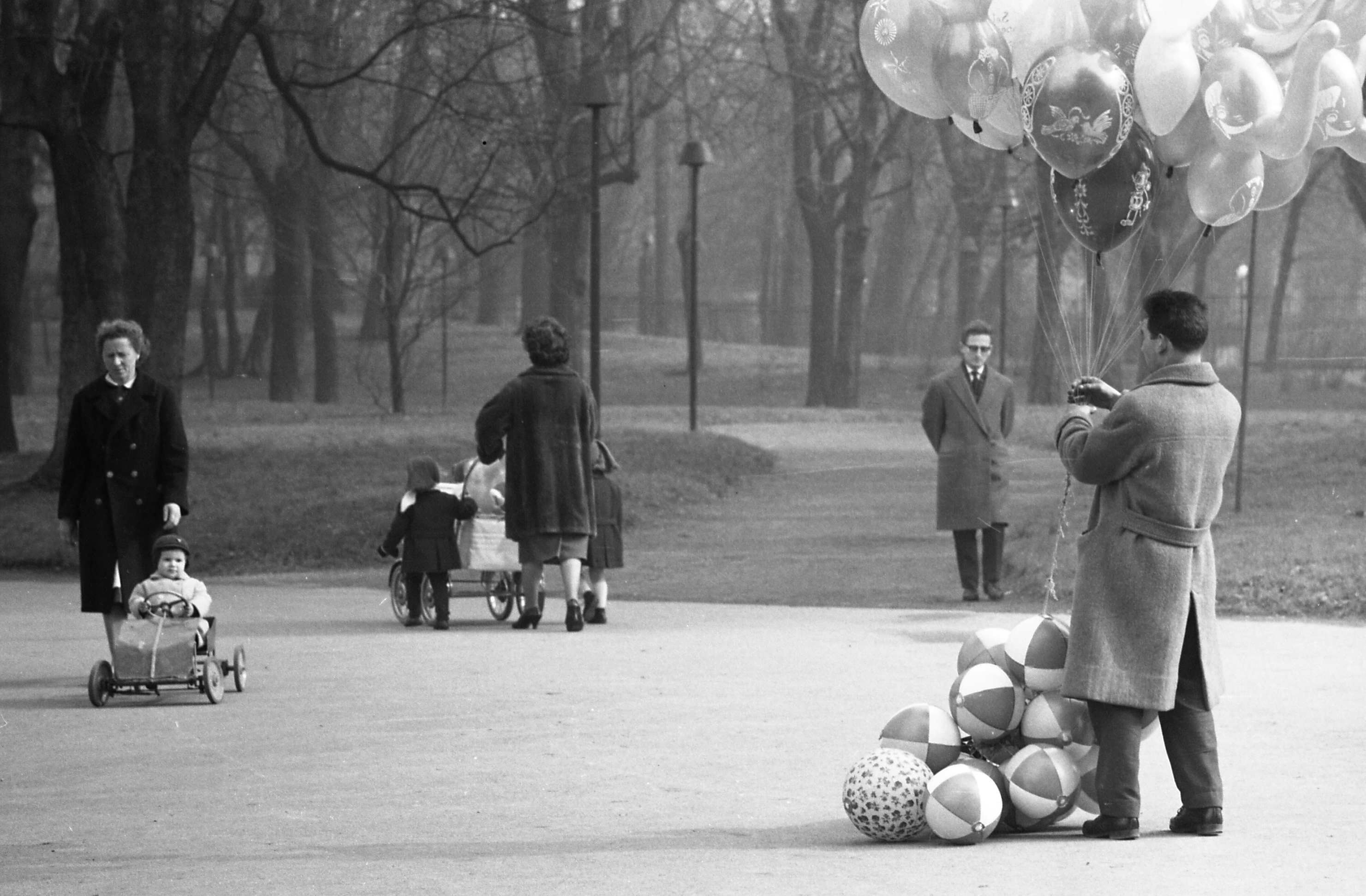 Serie fotografica : Milano, 1962 / Paolo Monti. - Strisce: 1, Fotogrammi complessivi: 5 : Negativo b/n, gelatina bromuro d'argento/ pellicola ; 35 mm. - ((I fotogrammi hanno una doppia numerazione. . - Sul portanegativi: Pentax FP3. - Serie Verde. - Fonte: Agenda di Paolo Monti: Foto Leica 1 / 1-51 verde, 1-110 nera (1958-1963), presso Archivio Paolo Monti